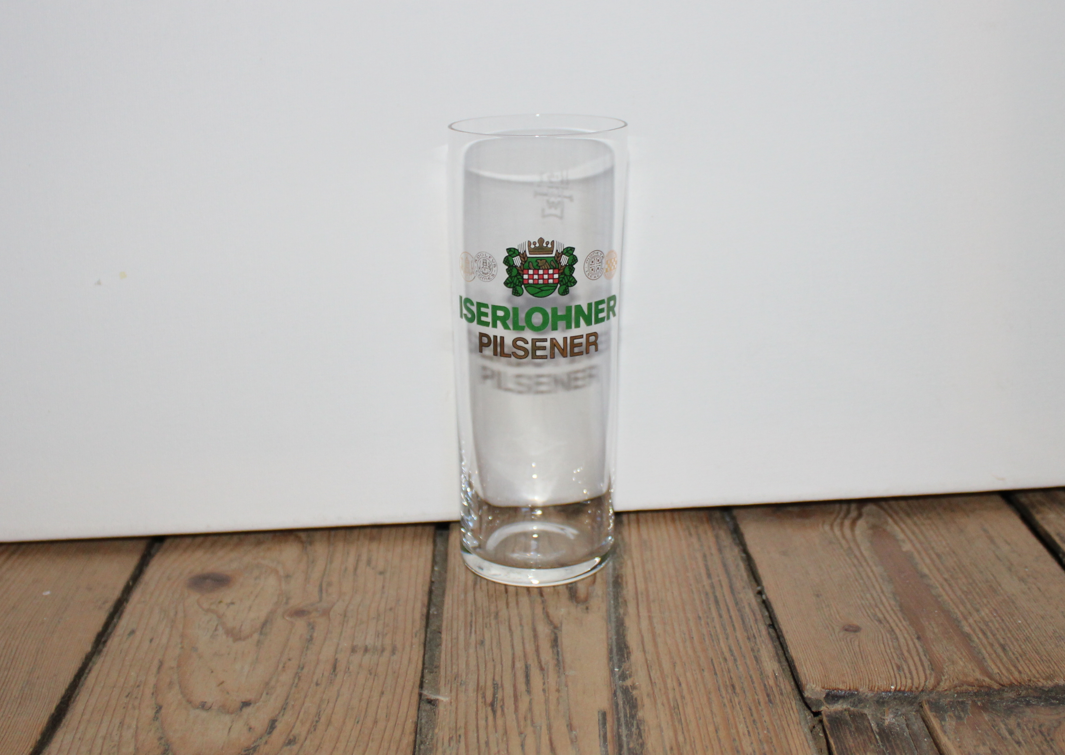 Bierglas Iserlohner Pilsener